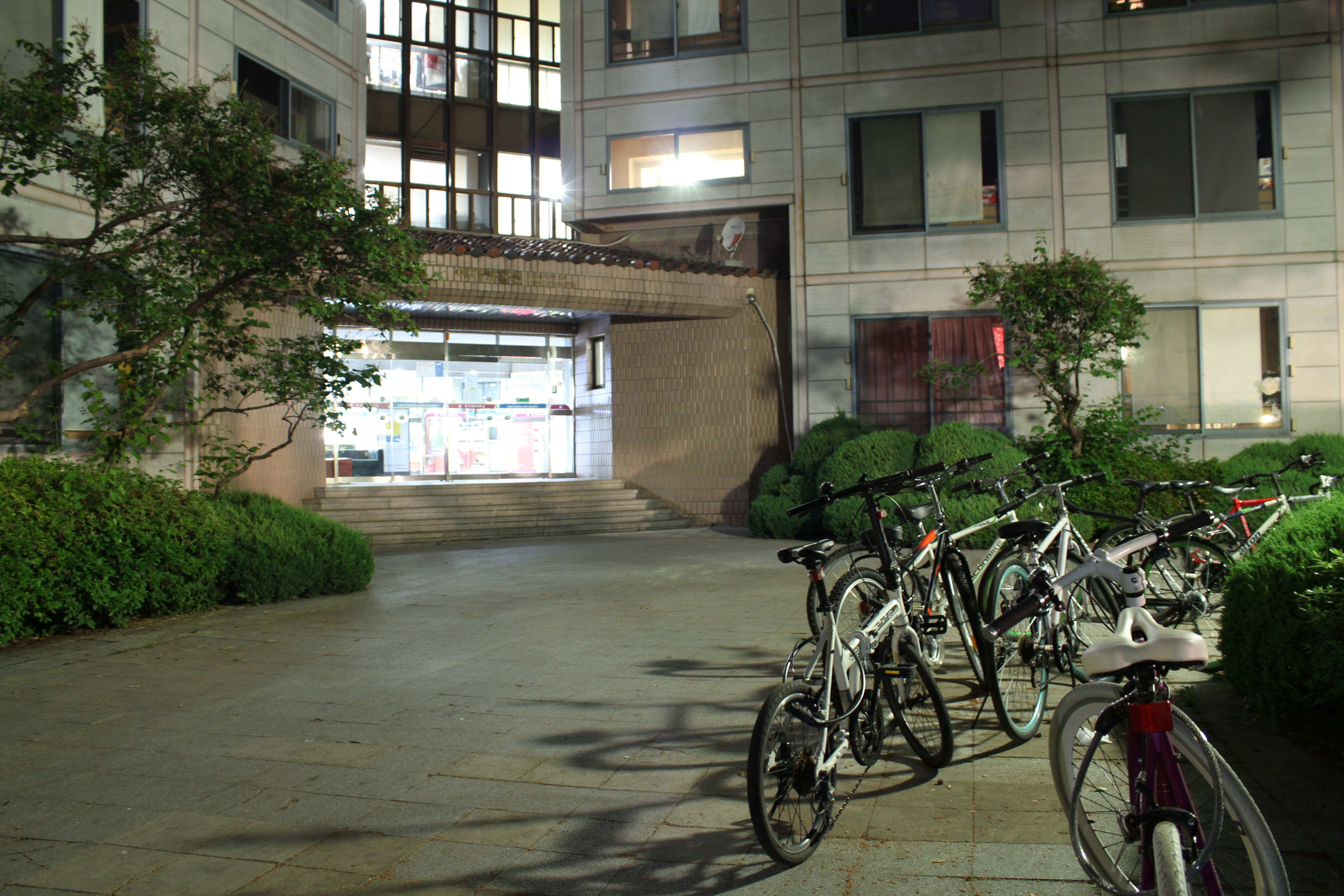 한국체육대학교 건물 출입구의 야겨ㅛㅇ.